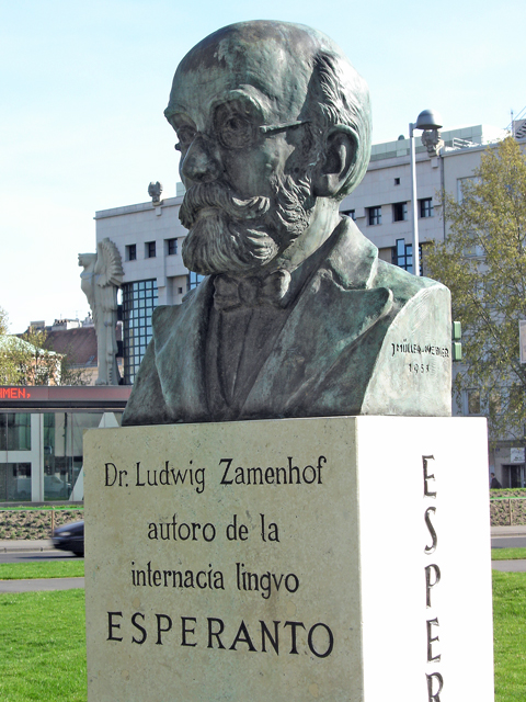 Zamenhof-monumento en Vieno